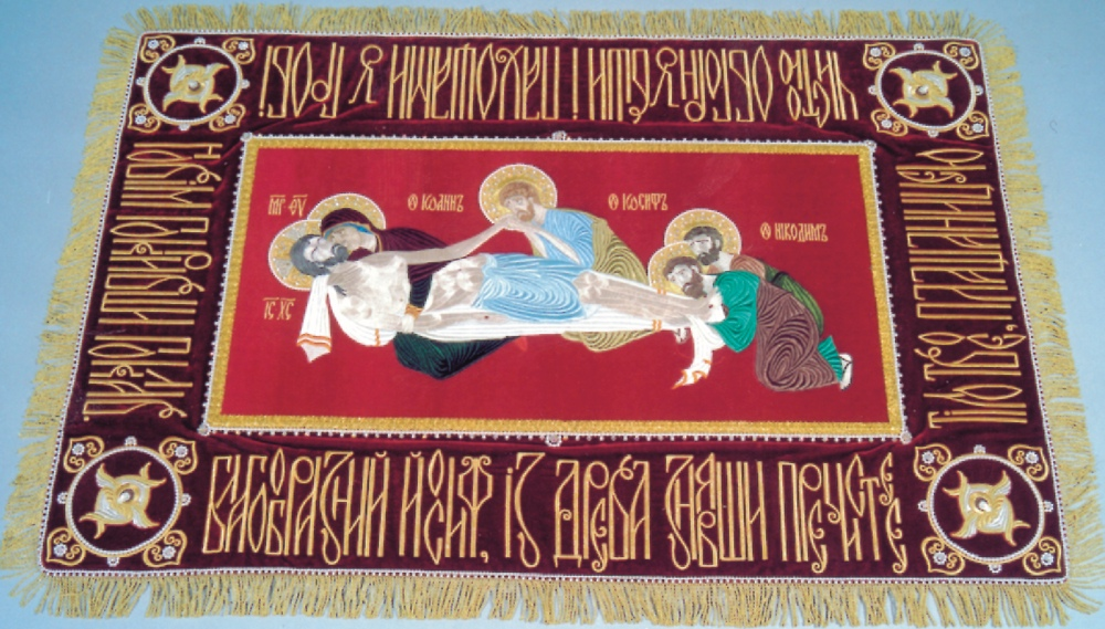 Oleg Blazhko's gold embroidery